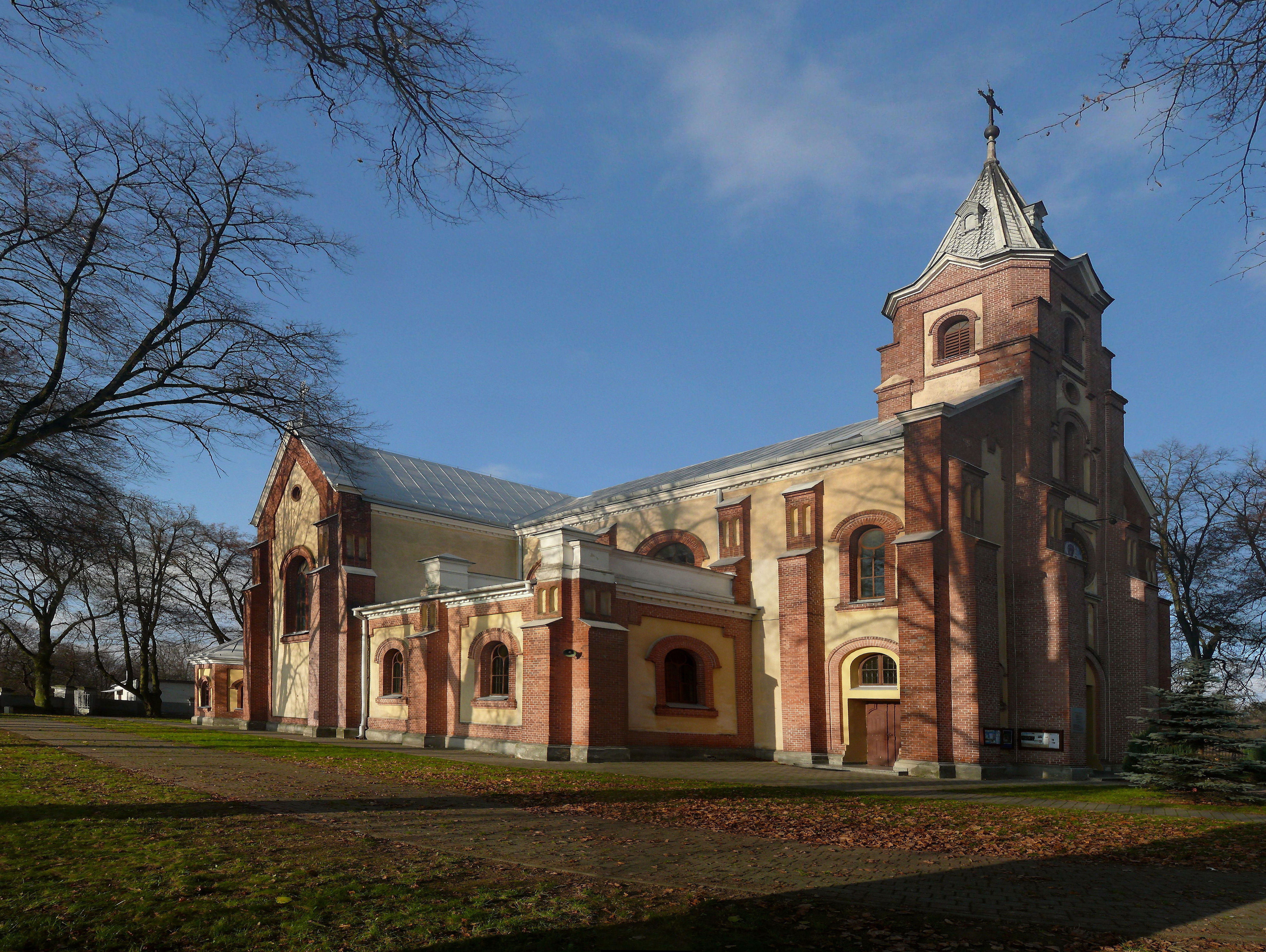 Kościół pw. Wniebowzięcia NMP i Św. Katarzyny Aleksandryjskiej w Konopnicy, powiat Lublin